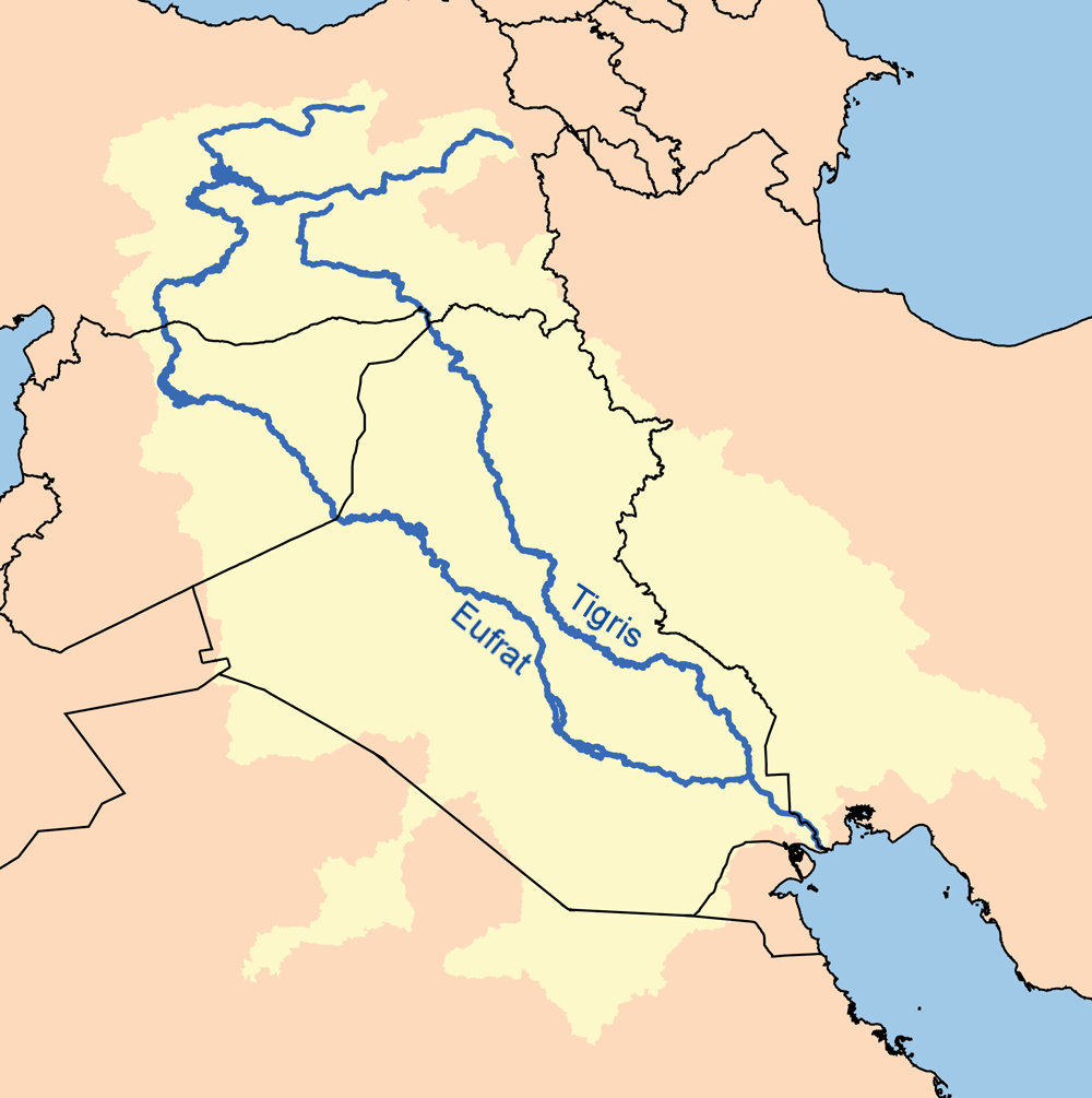 Zemljovid rijeka Eufrata i Tigrisa